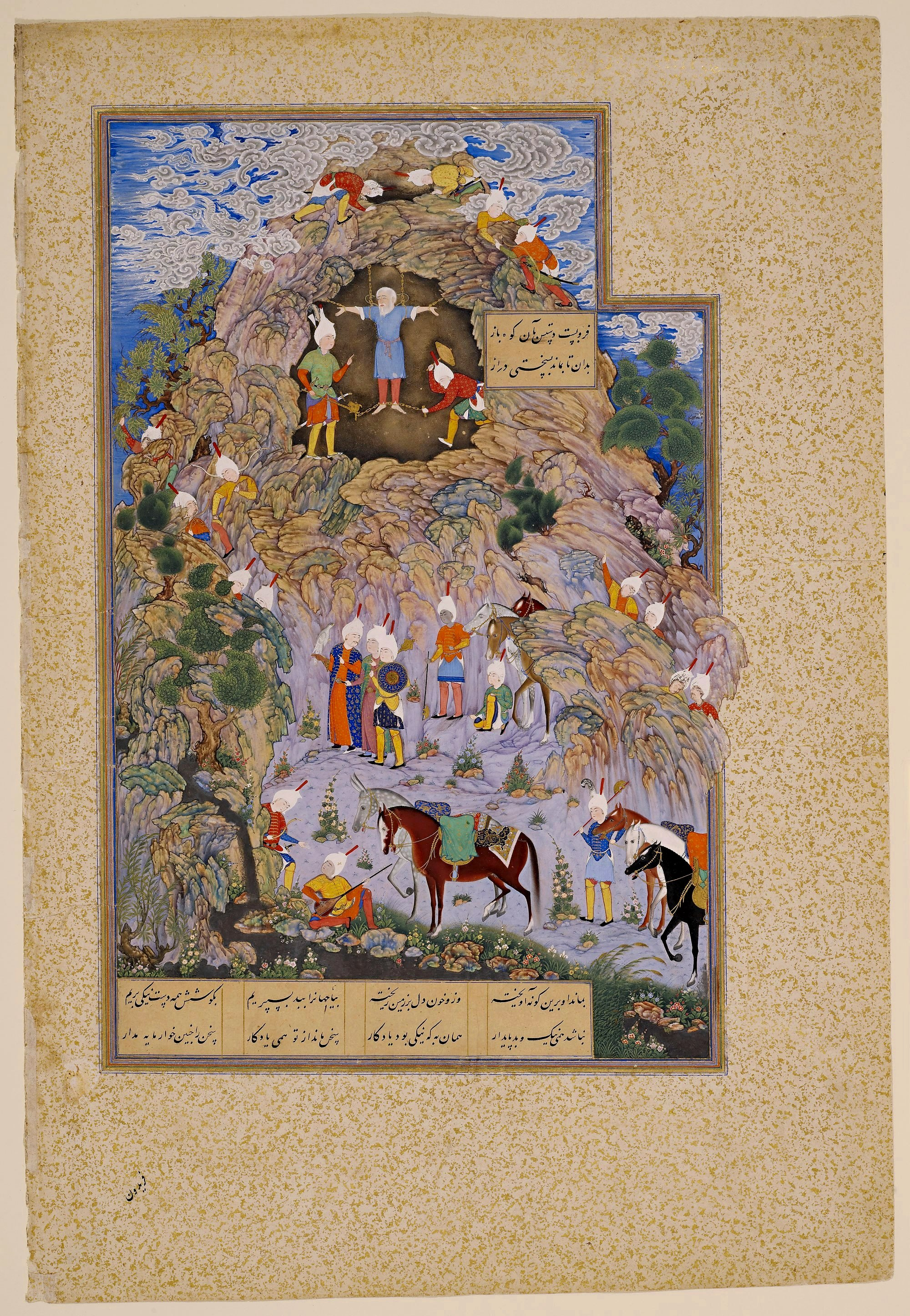 Султан Мухаммед. Тиран Заххак, закованный в цепи Фариданом. «Шахнаме Тахмаспа» 1525-35гг. Музей Метрополитен, Нью-Йорк.